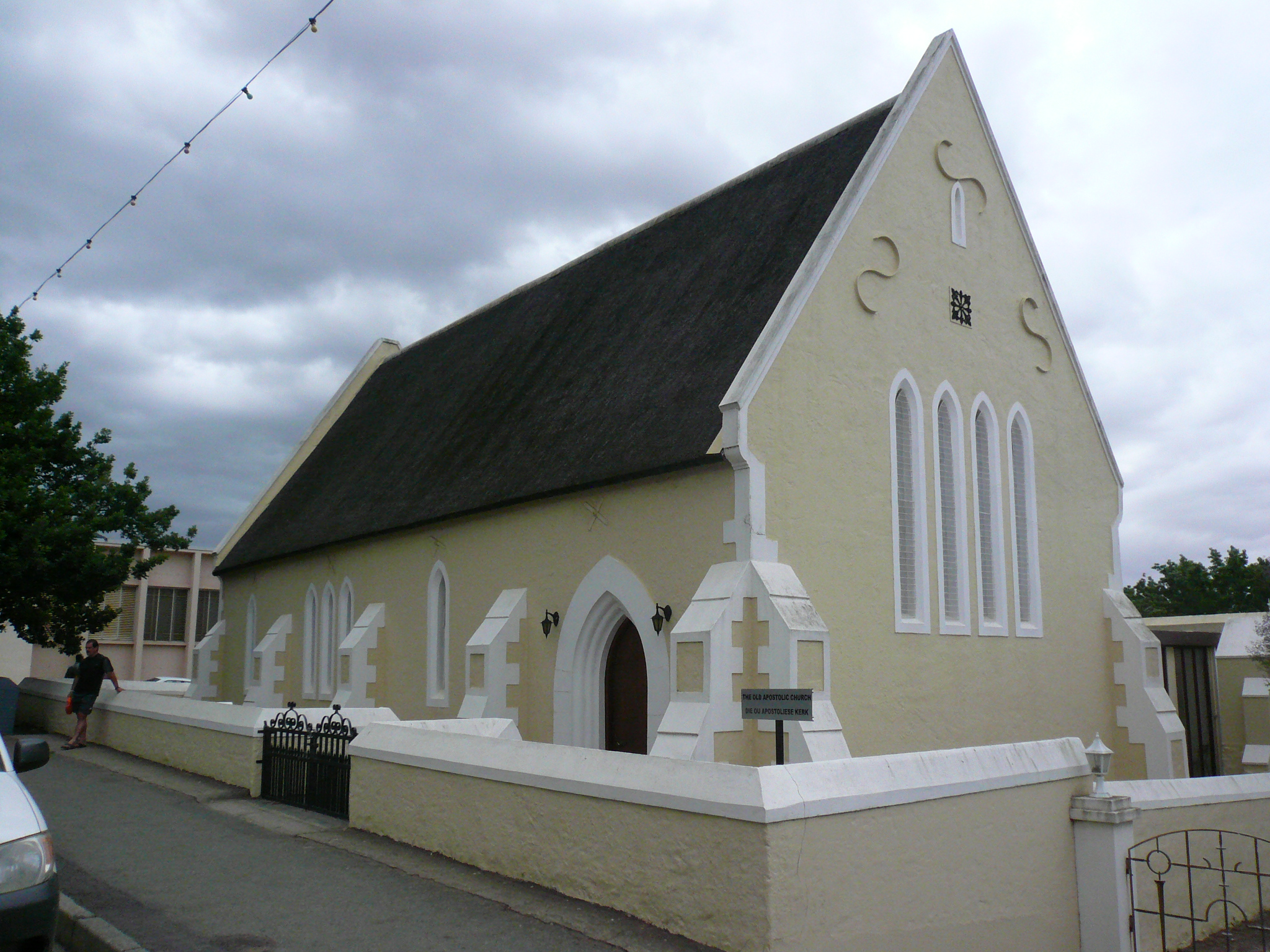 Altapostolische Kirche in Swellendam, Südafrika This media shows a South African Protected Site with SAHRA file reference 9/2/092/0057.